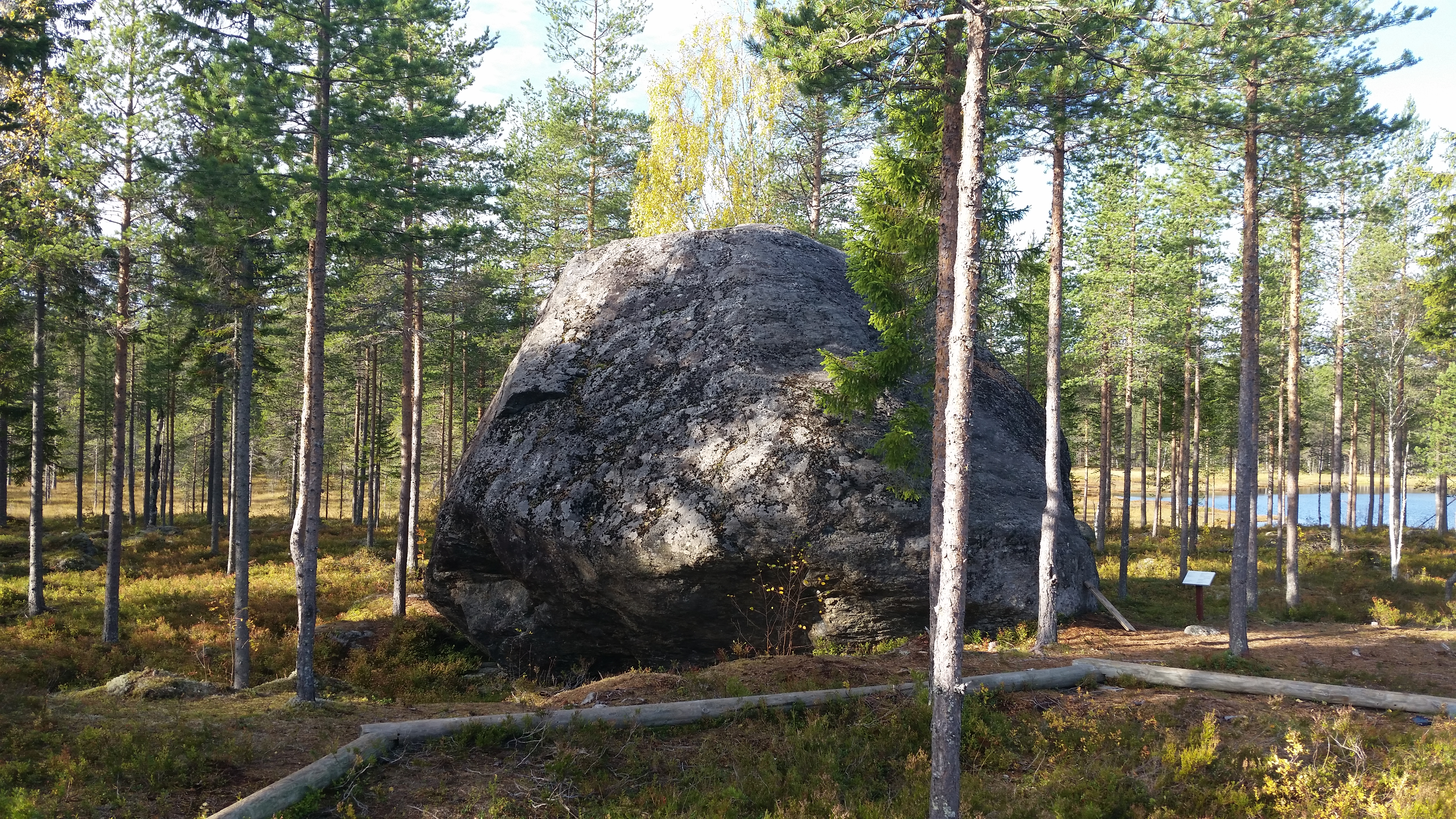 Flyttblocket som givit Stora stenens friluftsområde dess namn.